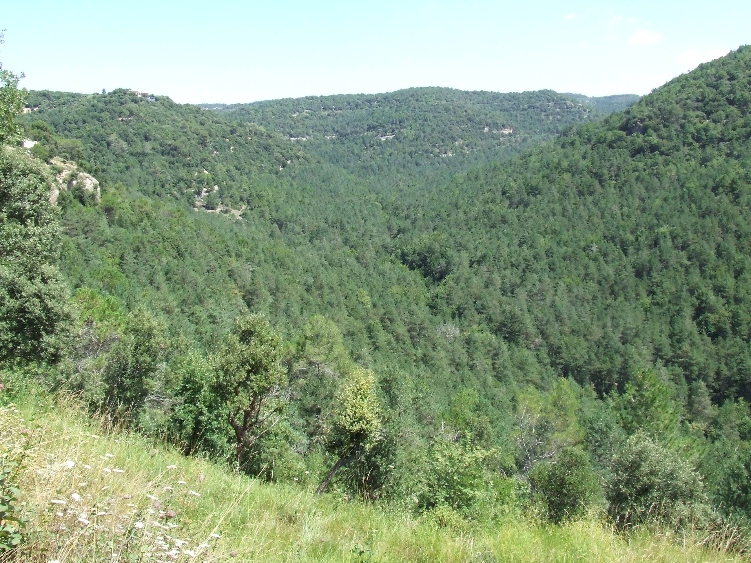 El Torrent de Sauva Negra (Santa Coloma Sasserra, Castellcir, Moianès)